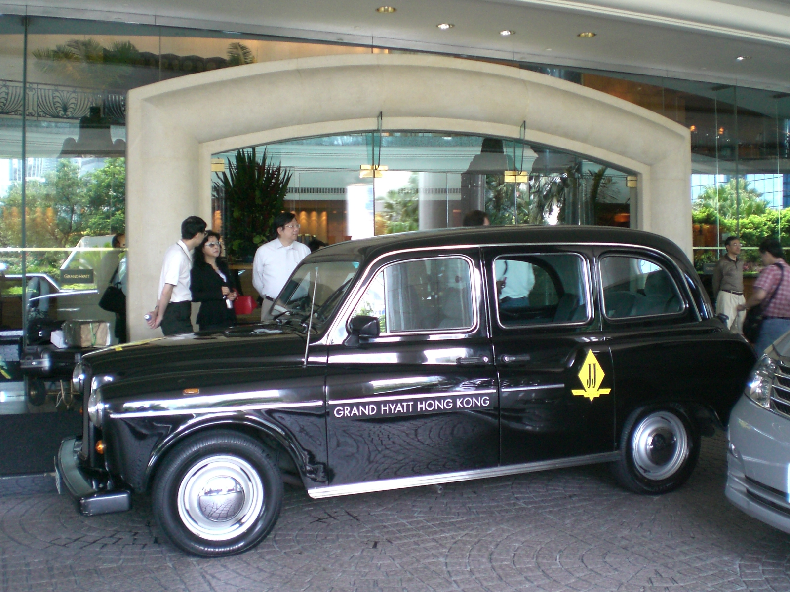 香港君悅酒店, Grand Hyatt Hong Kong, Wan Chai, Hong Kong.